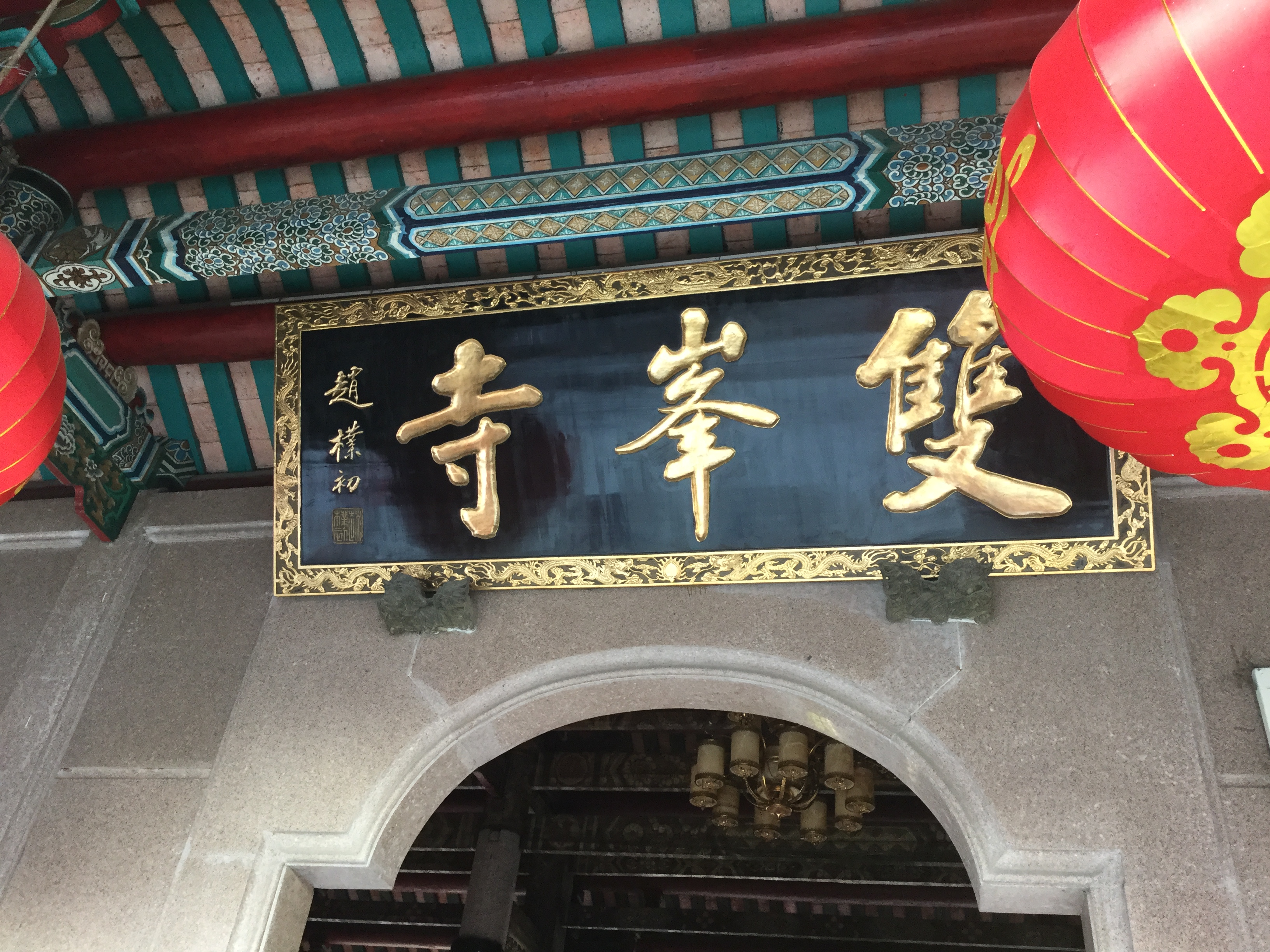 揭阳双峰寺匾额